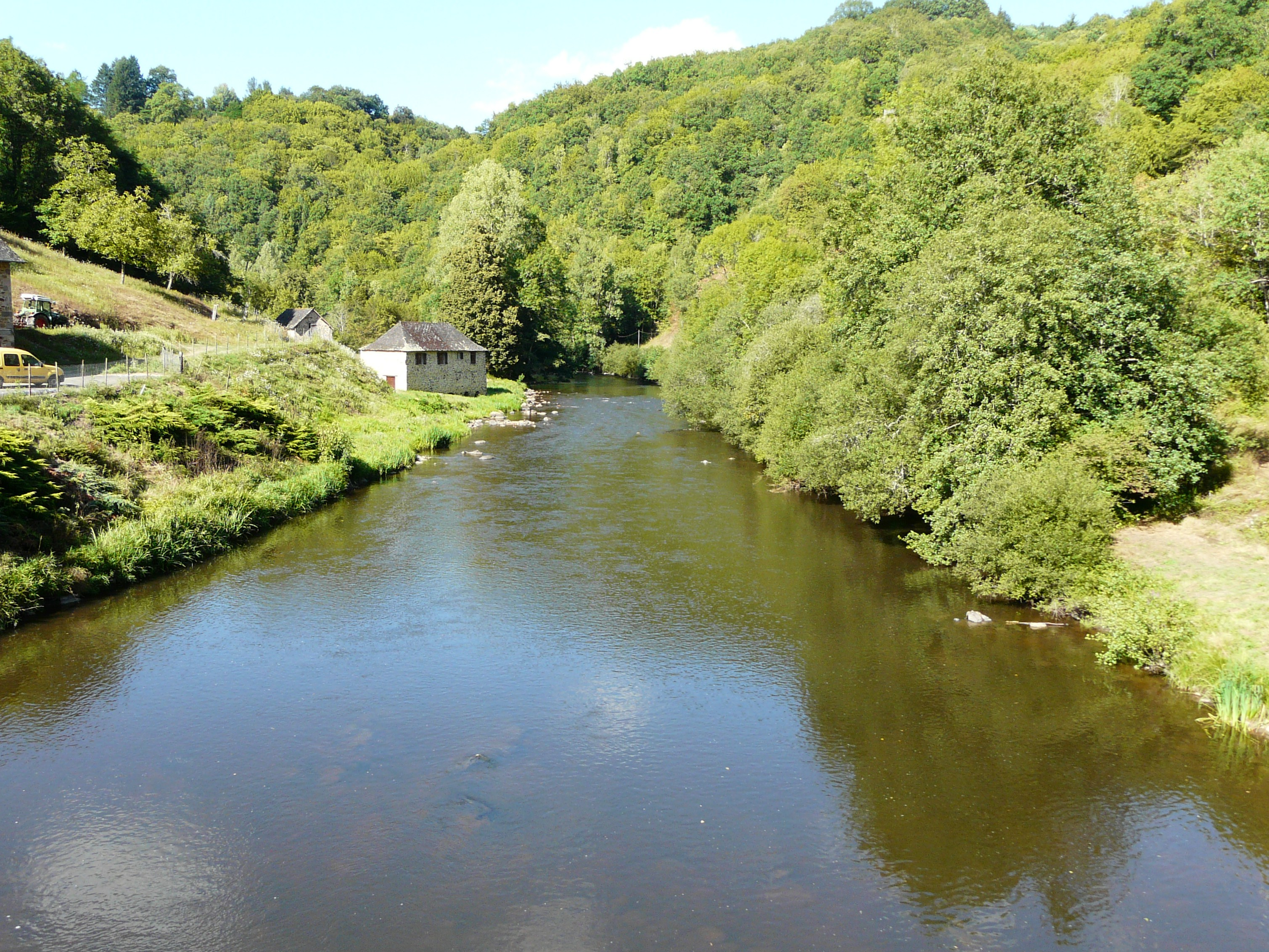 La Vézère en amont du pont de Comborn (route départementale 9E2), entre Orgnac-sur-Vézère à gauche et Estivaux à droite ; Corrèze, France.